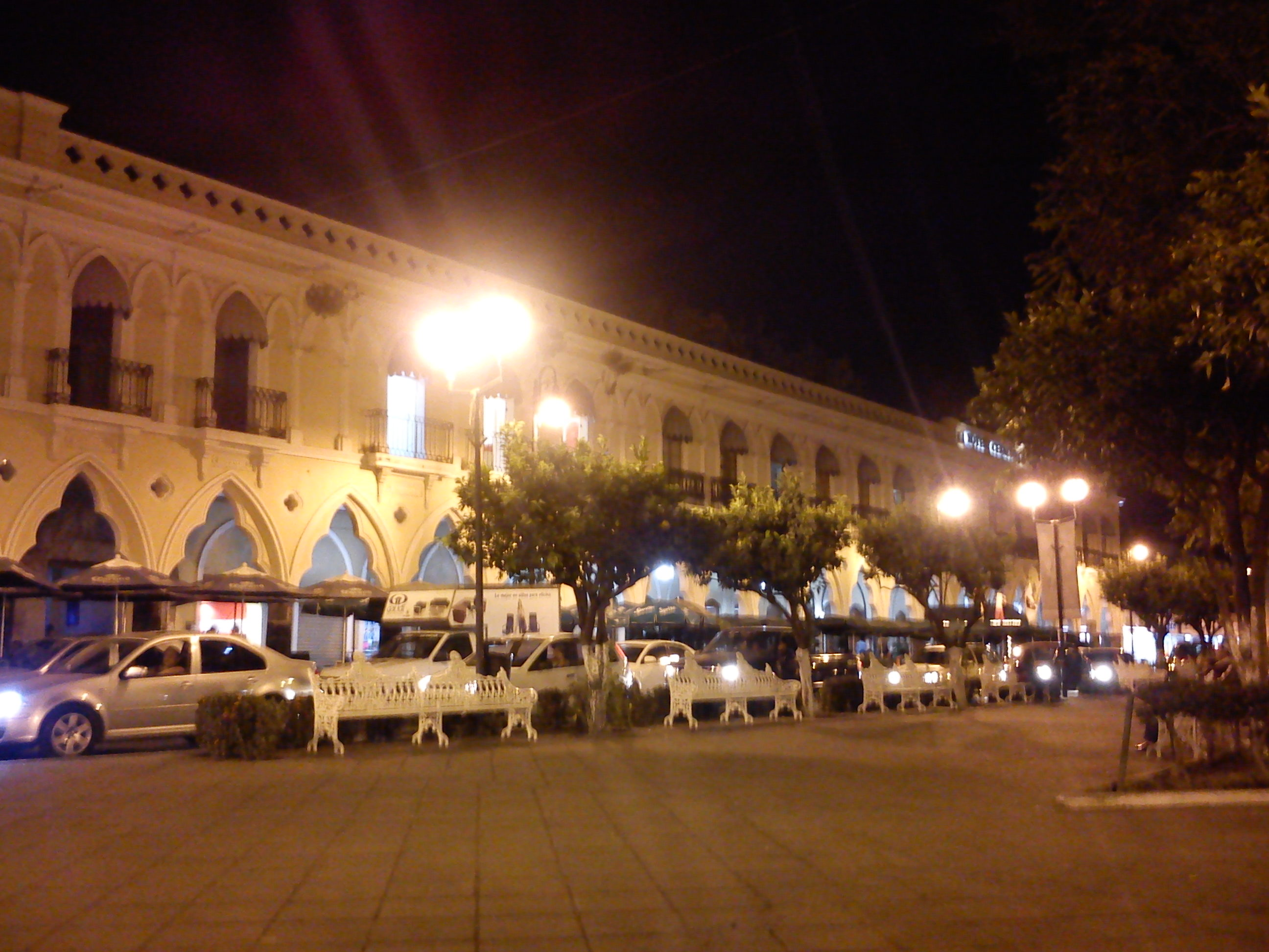 Portal Medellín, Colima, Colima, México